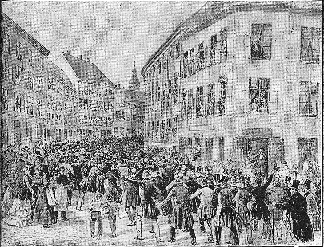 Folketoget i København den 21. marts 1848.